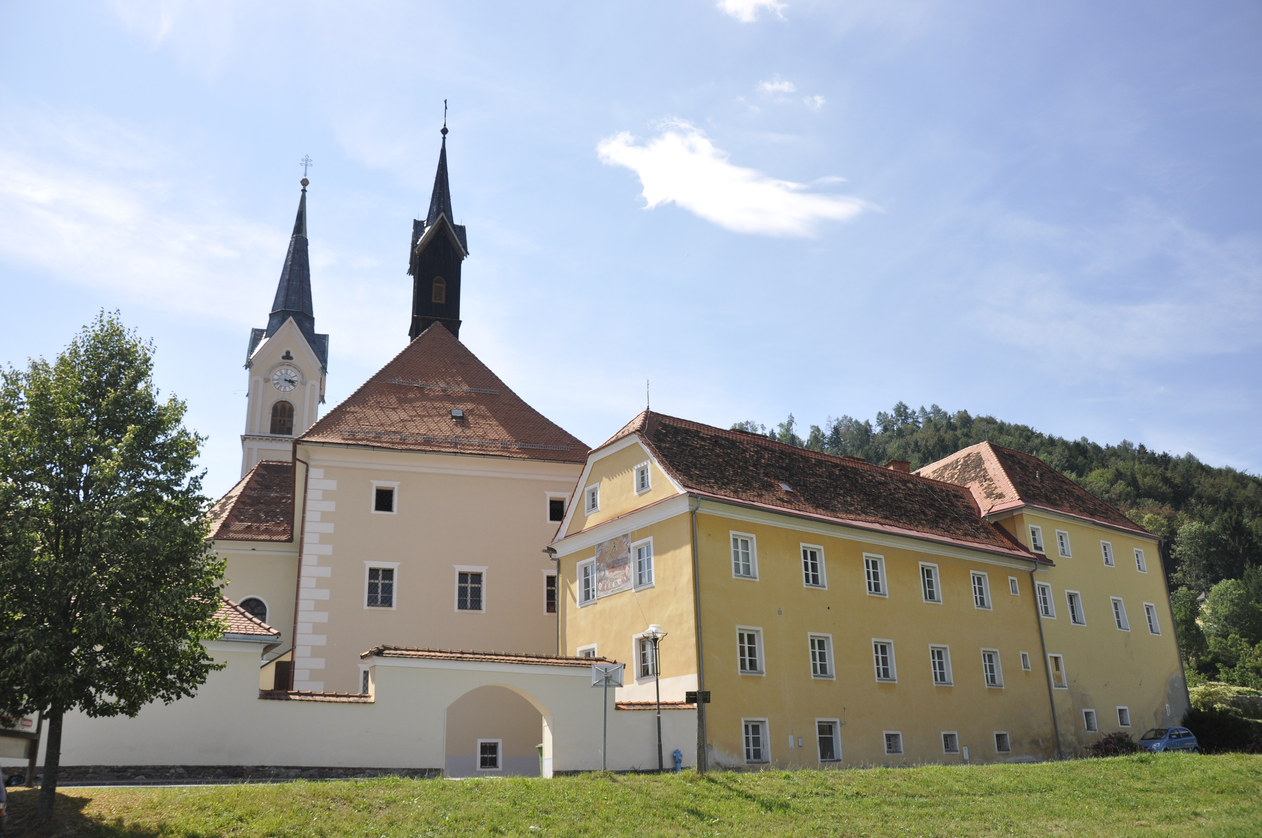 Franziskanerkloster